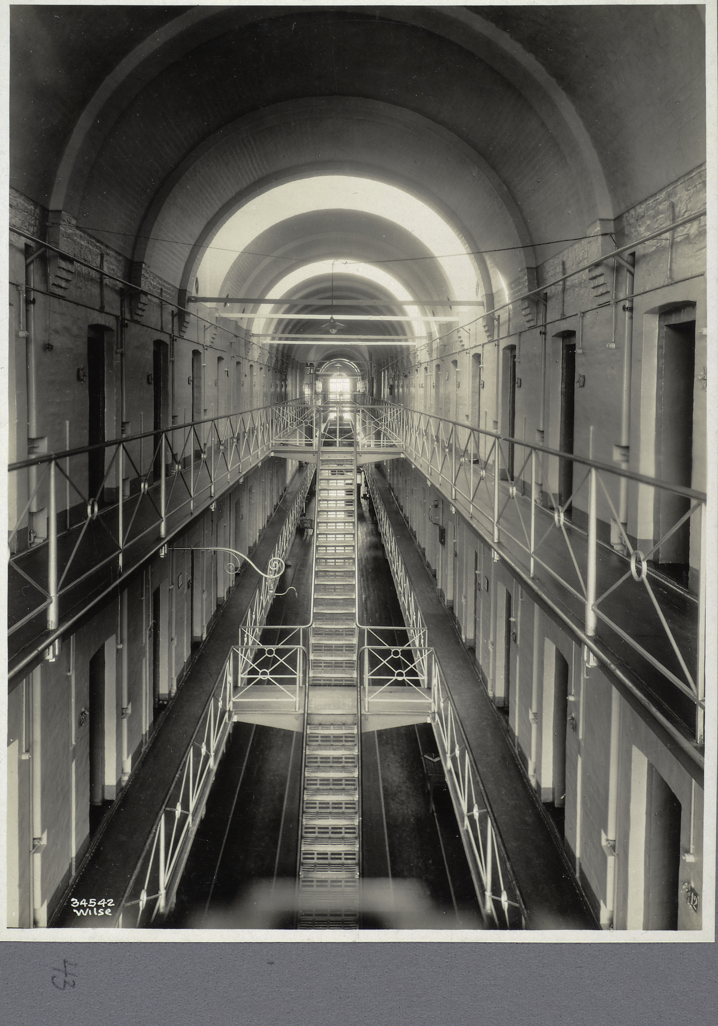 Bildet er hentet fra Arkivverket. Straffeanstalt, Oslo. Botsfengselet, interiør. Arkivinstitusjon : Riksarkivet Arkivnavn : Justisdepartementet, Fengselsstyret Sted : NORGE, Oslo, Oslo, Emneord: fengsel, straff, straffeanstalt, kriminalitet, institusjonsarkitektur, interiør Avbildet